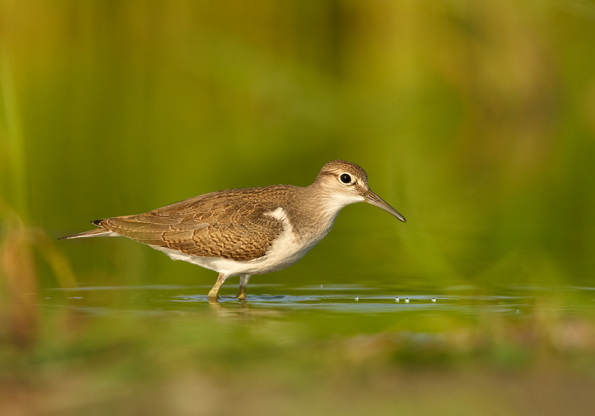 Actitis hypoleucos, střední Morava, CZ